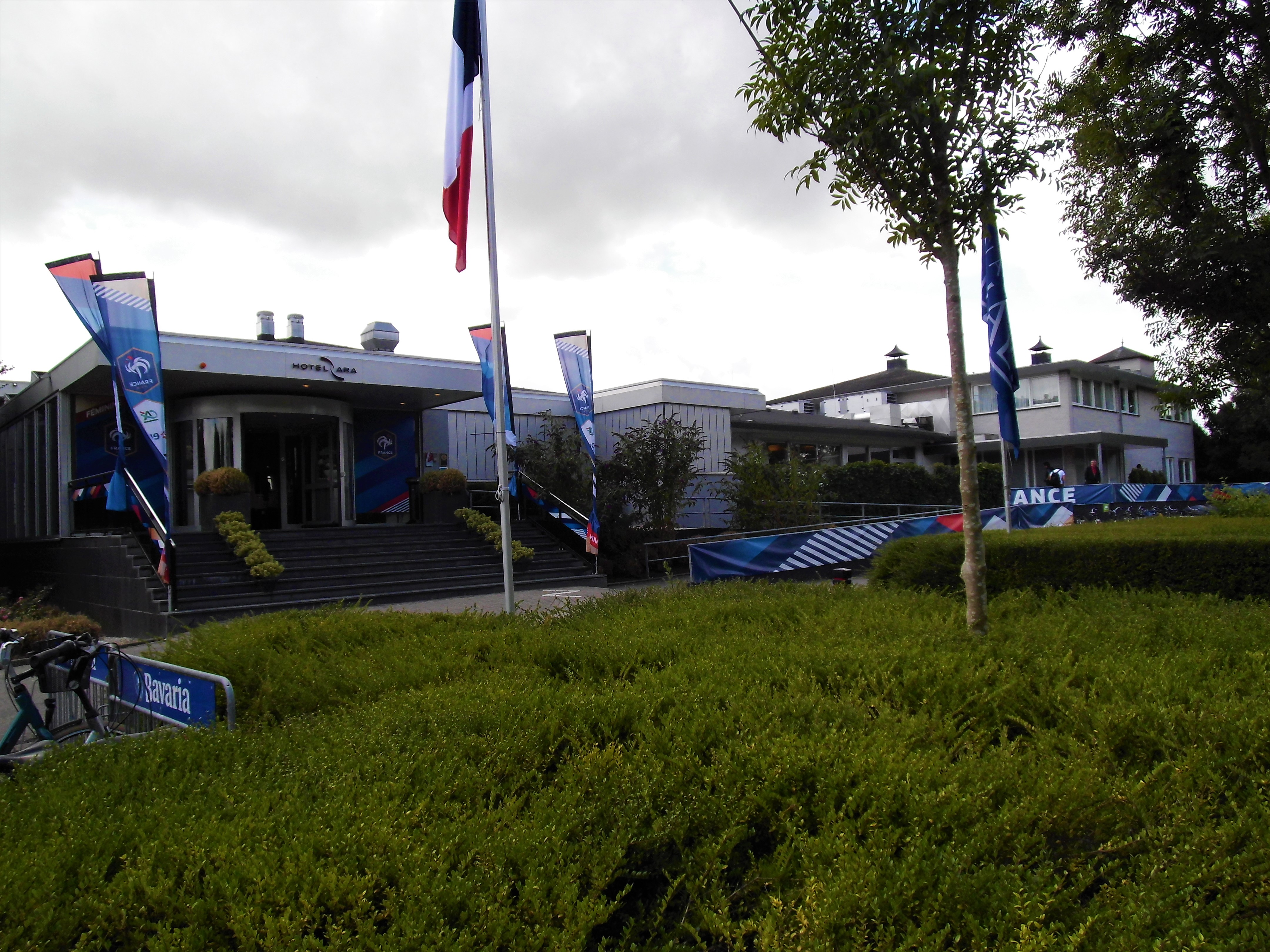 Hotel Ara, Französisches Teamquartier während der EM 2017 in Zwijndrecht an der Oude Maas / Hôtel Ara, camp de base des Bleues pendant le CE 2017 à Zwijndrecht